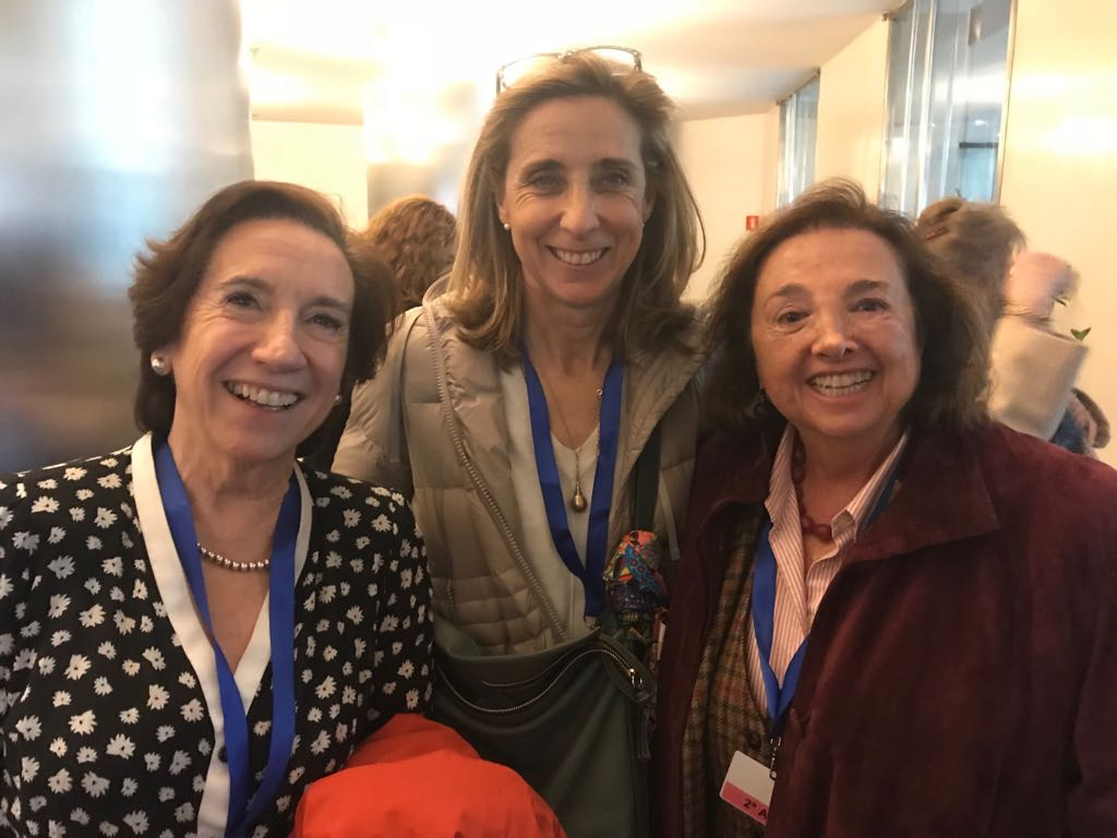 Jornada Igualdad en las radiotelevisiones públicas. Congreso de Diputados. Organizada por UGT RTVE